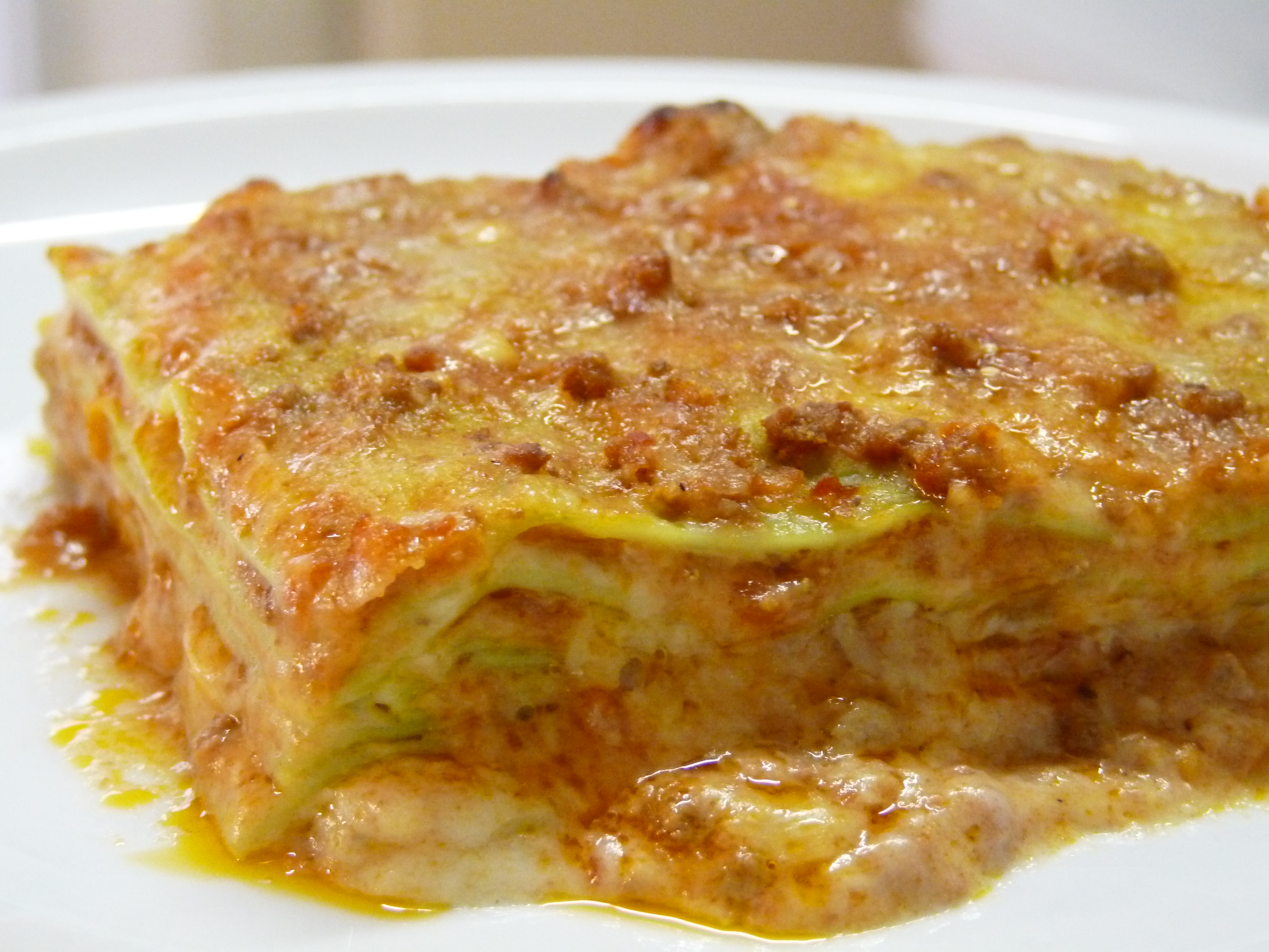 la lasagna bolognese composta da 7 sfoglie verdi di pasta all'uovo, ragù, besciamella e parmigiano-reggiano